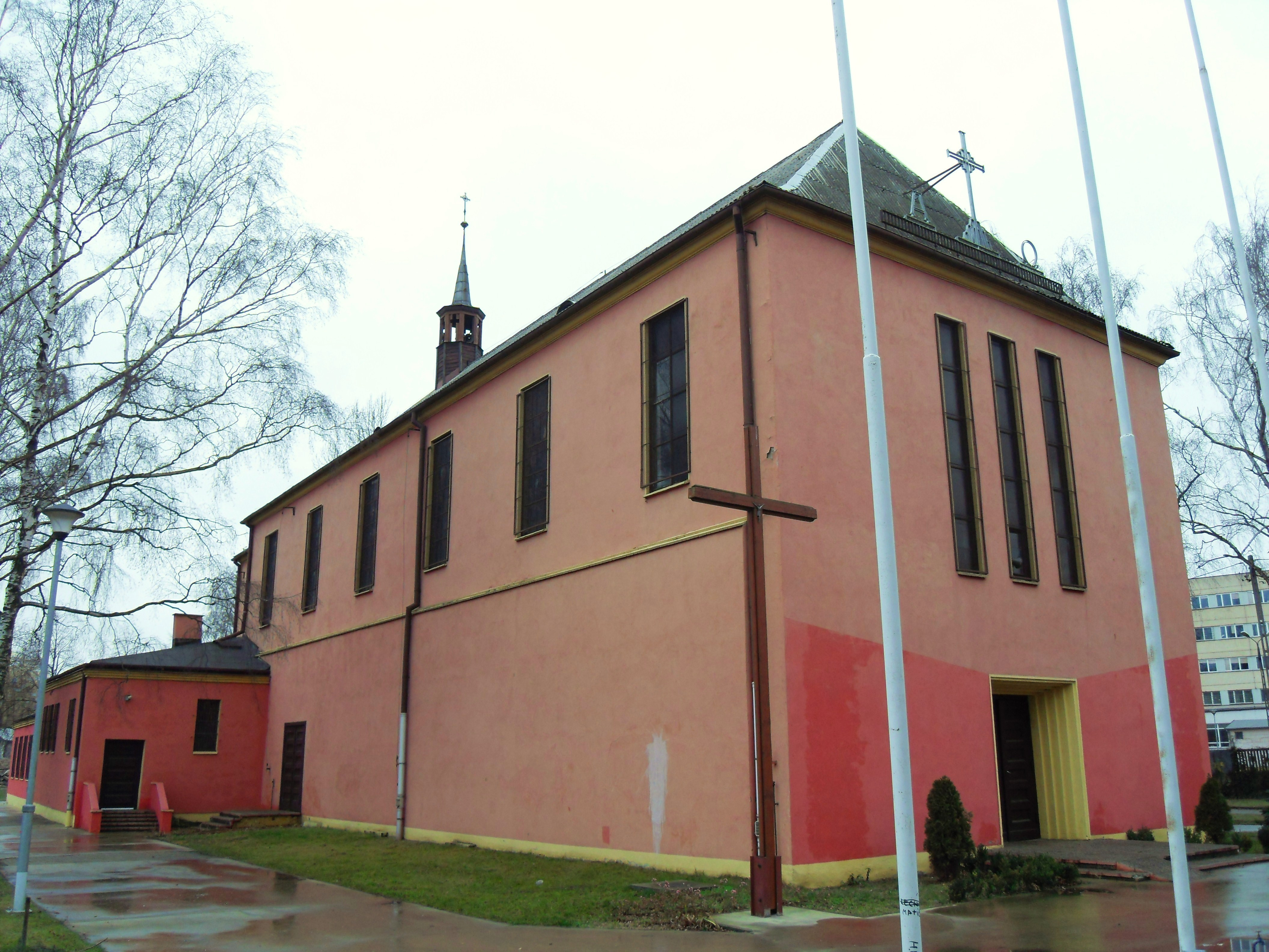 Gdańsk Letnica. Kościół św. Anny i Joachima, ul. Sucha 3.